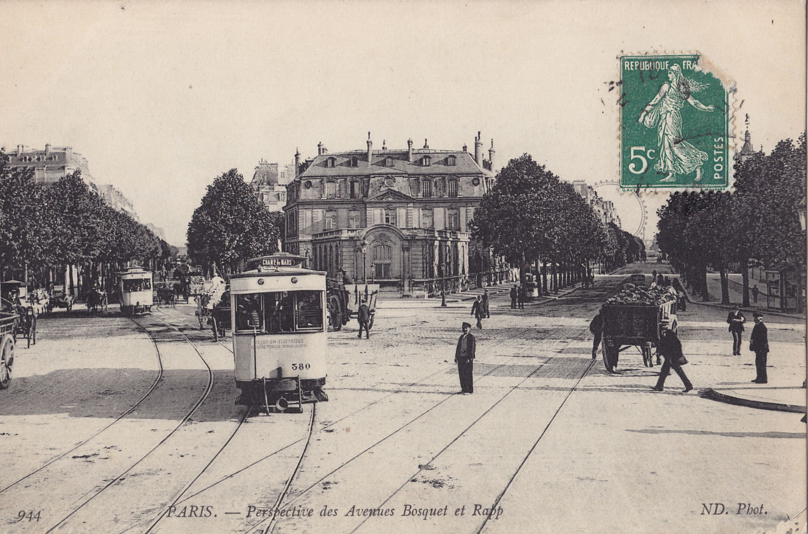 Carte postale ancienne éditée par ND, n°944 : PARIS - Avenues Bosquet et Rapp